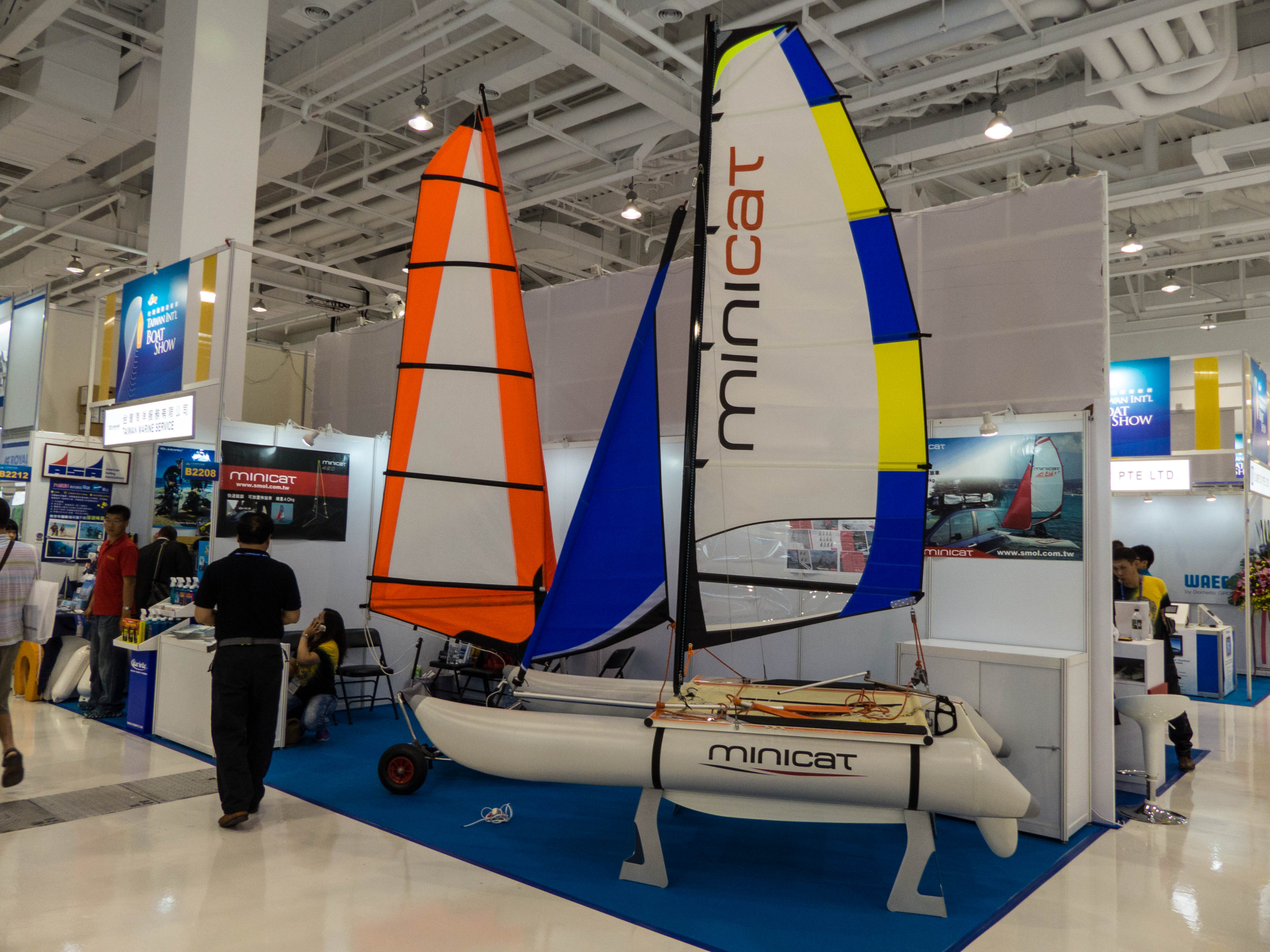 台灣國際遊艇展北展覽廳，莫斯企業攤位展示之minicat可攜帶式帆船。